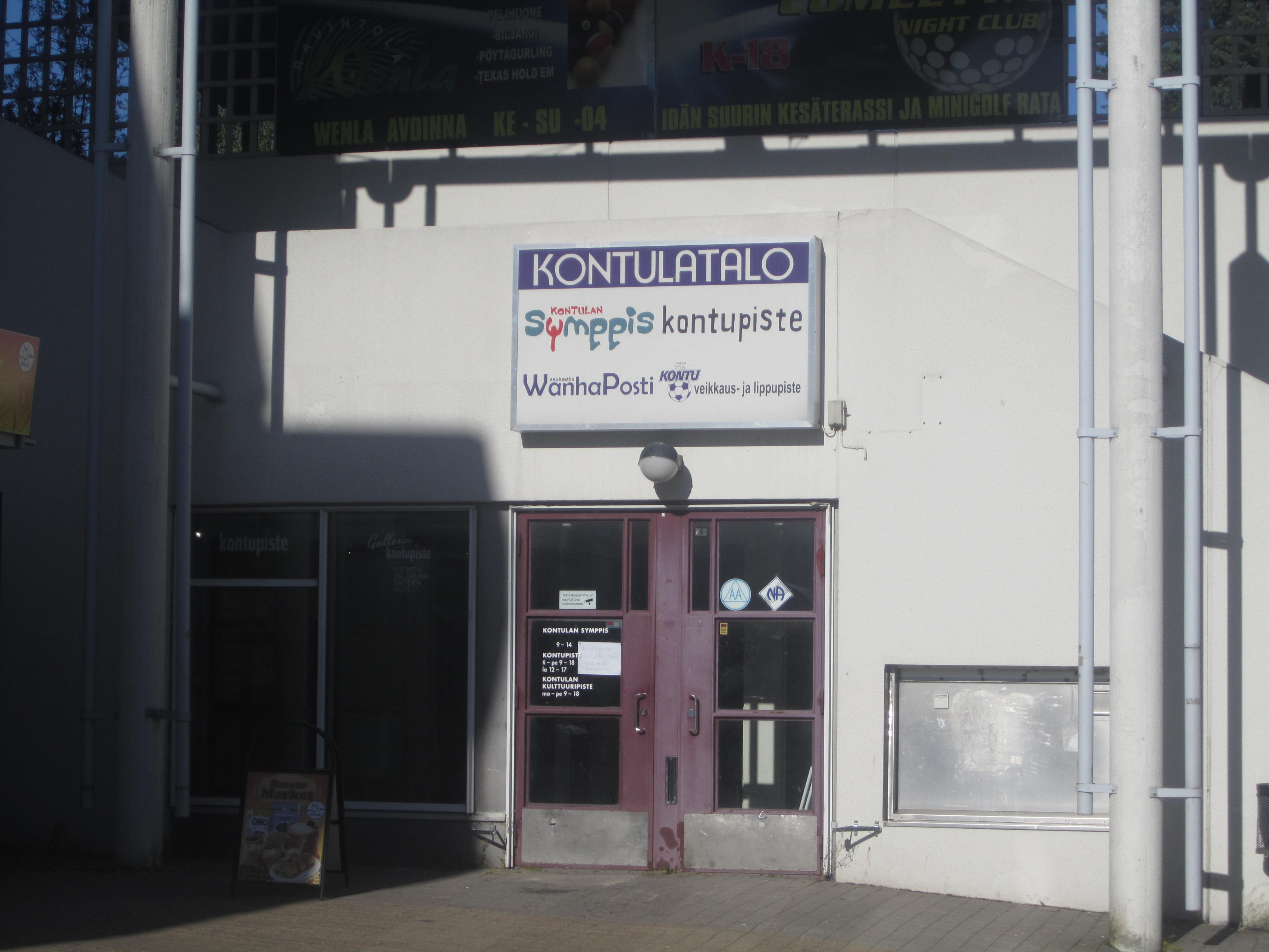 Kontulatalo Helsingin Kontulassa.